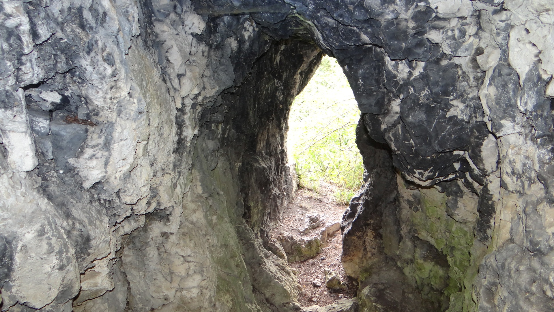 Schronisko Pierwsze w Wąwozie Ostryszni w Imbramowicach